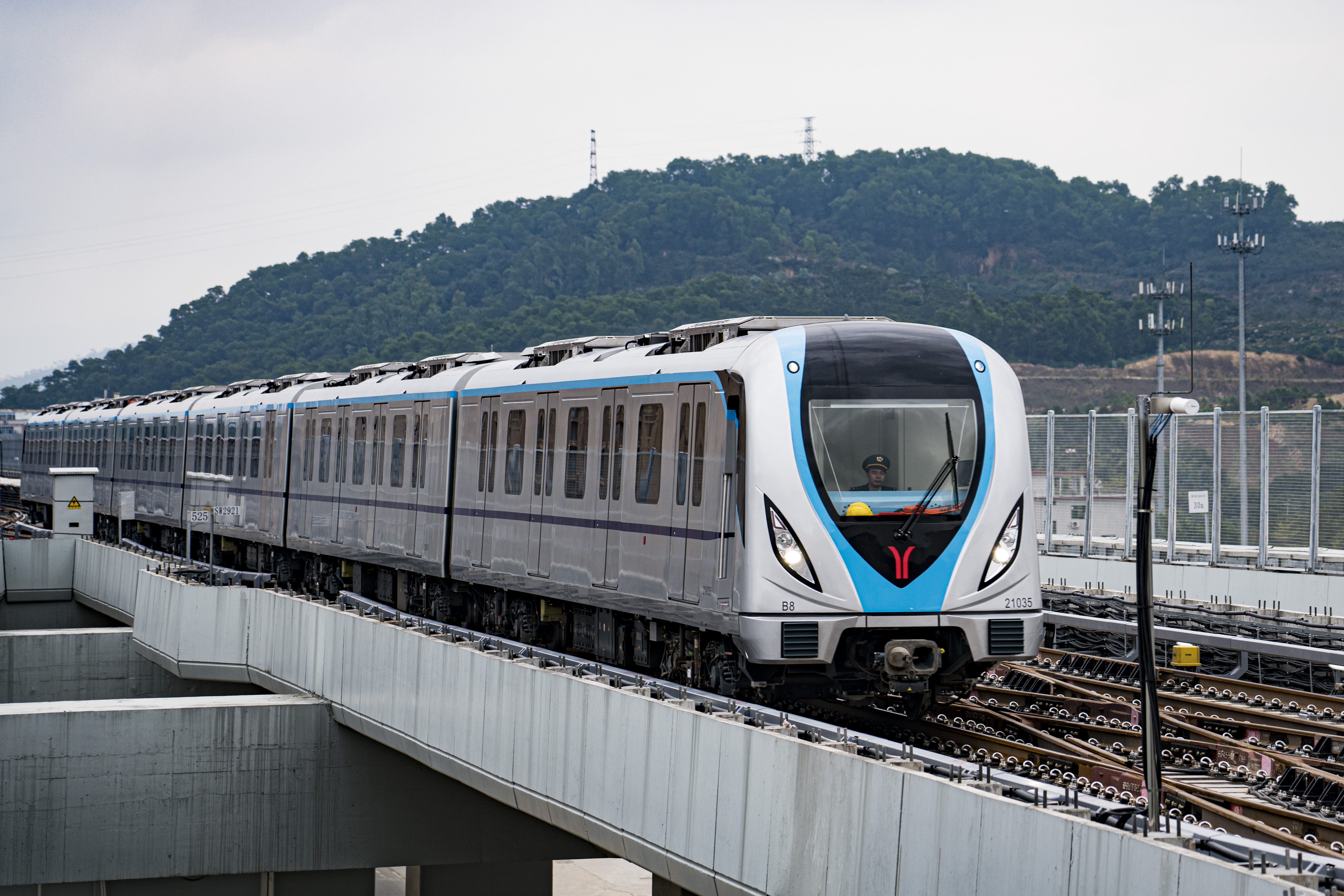 广州地铁21号线列车到达山田站